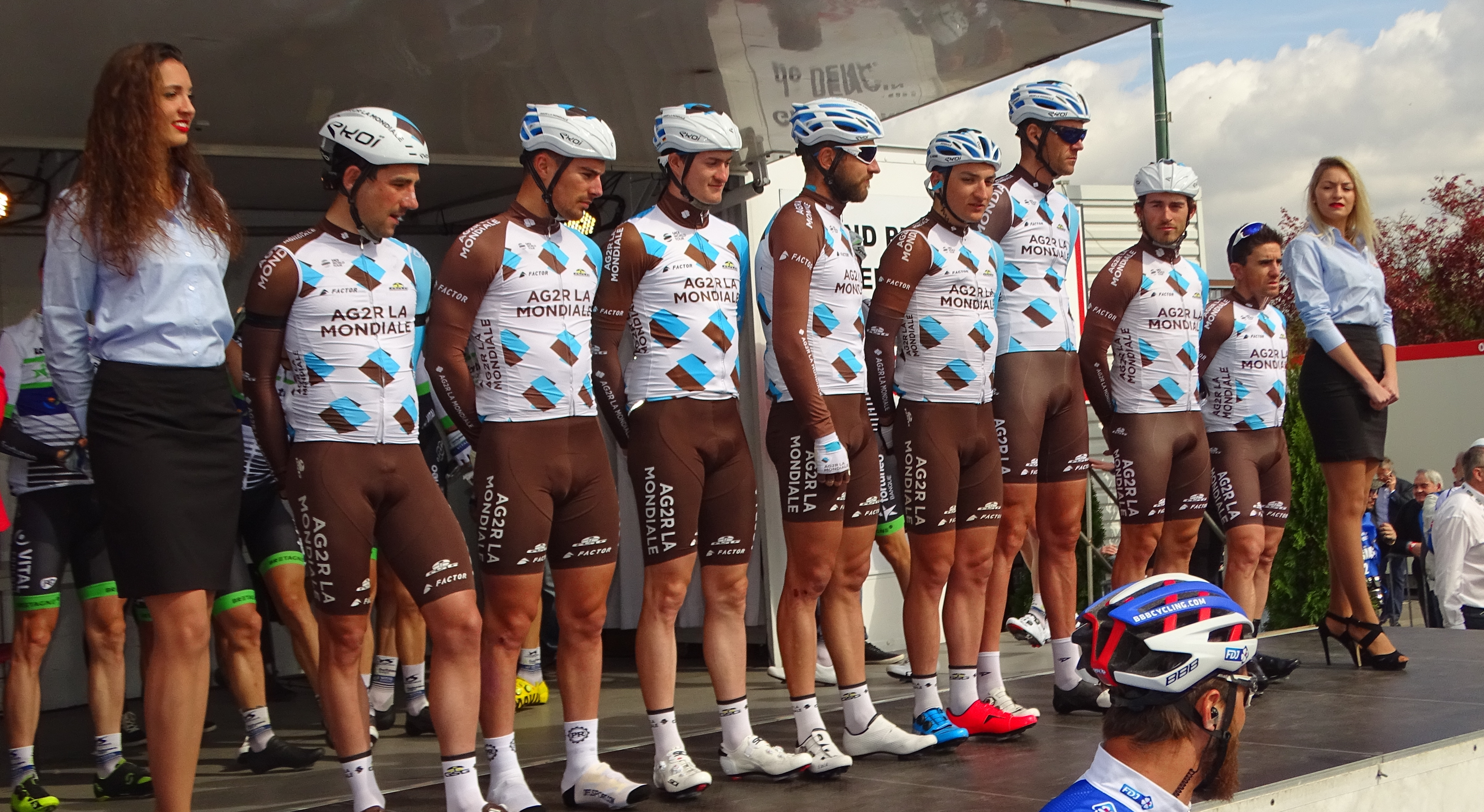 Reportage réalisé le jeudi 13 avril à l'occasion du départ et de l'arrivée du Grand Prix de Denain 2017 à Denain, Nord, Nord-Pas-de-Calais-Picardie, France.